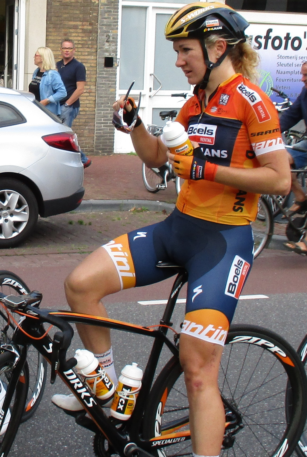 4e etappe van de Boels Ladies Tour 2017 door Noord-Limburg, finish in Weert.